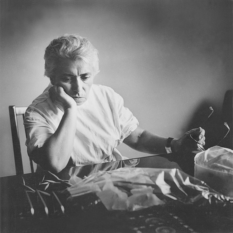 Moldovan surgeon Natalia Gheorghiu (70-ies).